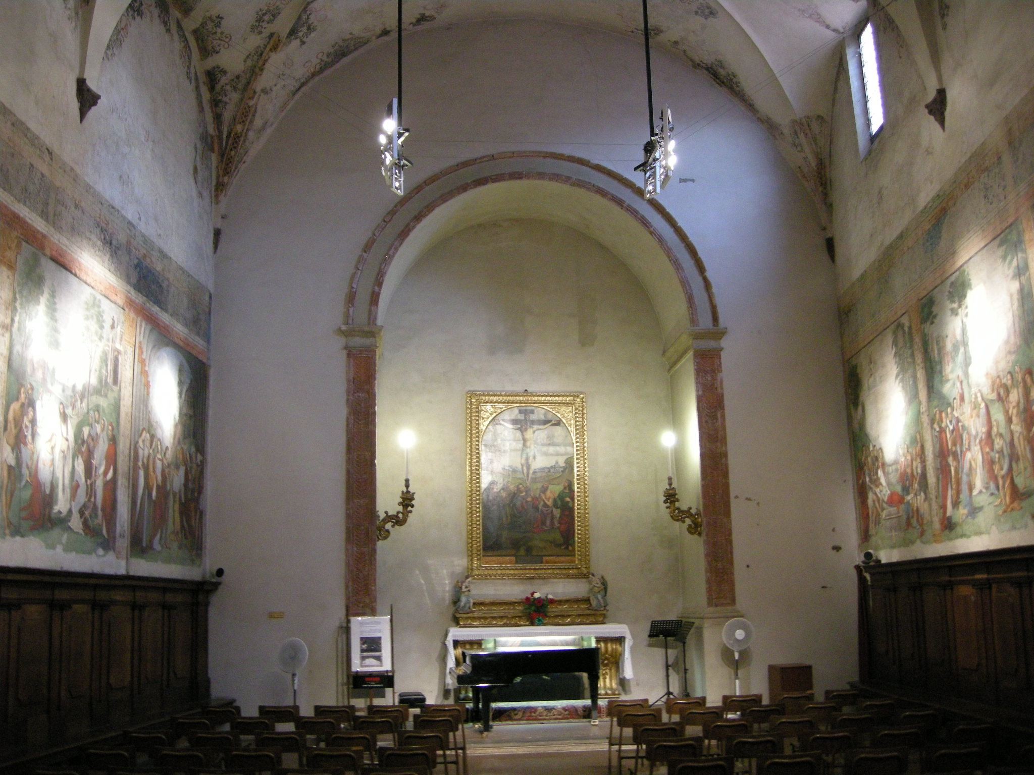 Oratorio di santa cecilia